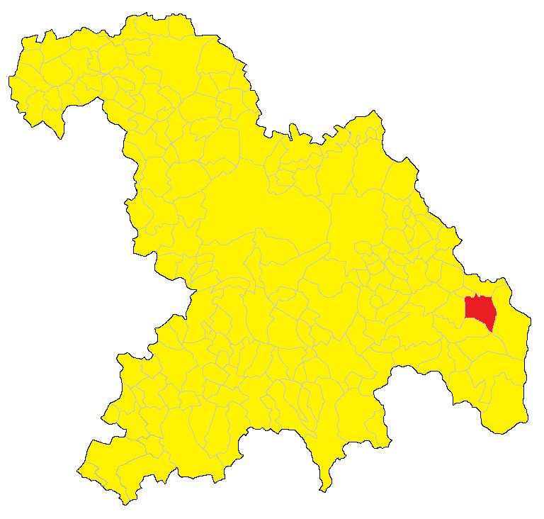 Mappa del comune di Montacuto (AL)